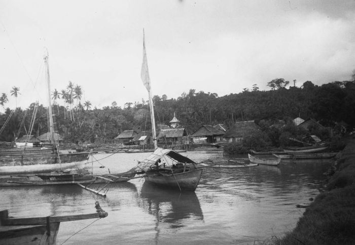 negatief. Gezicht op Wahai vanaf de steiger